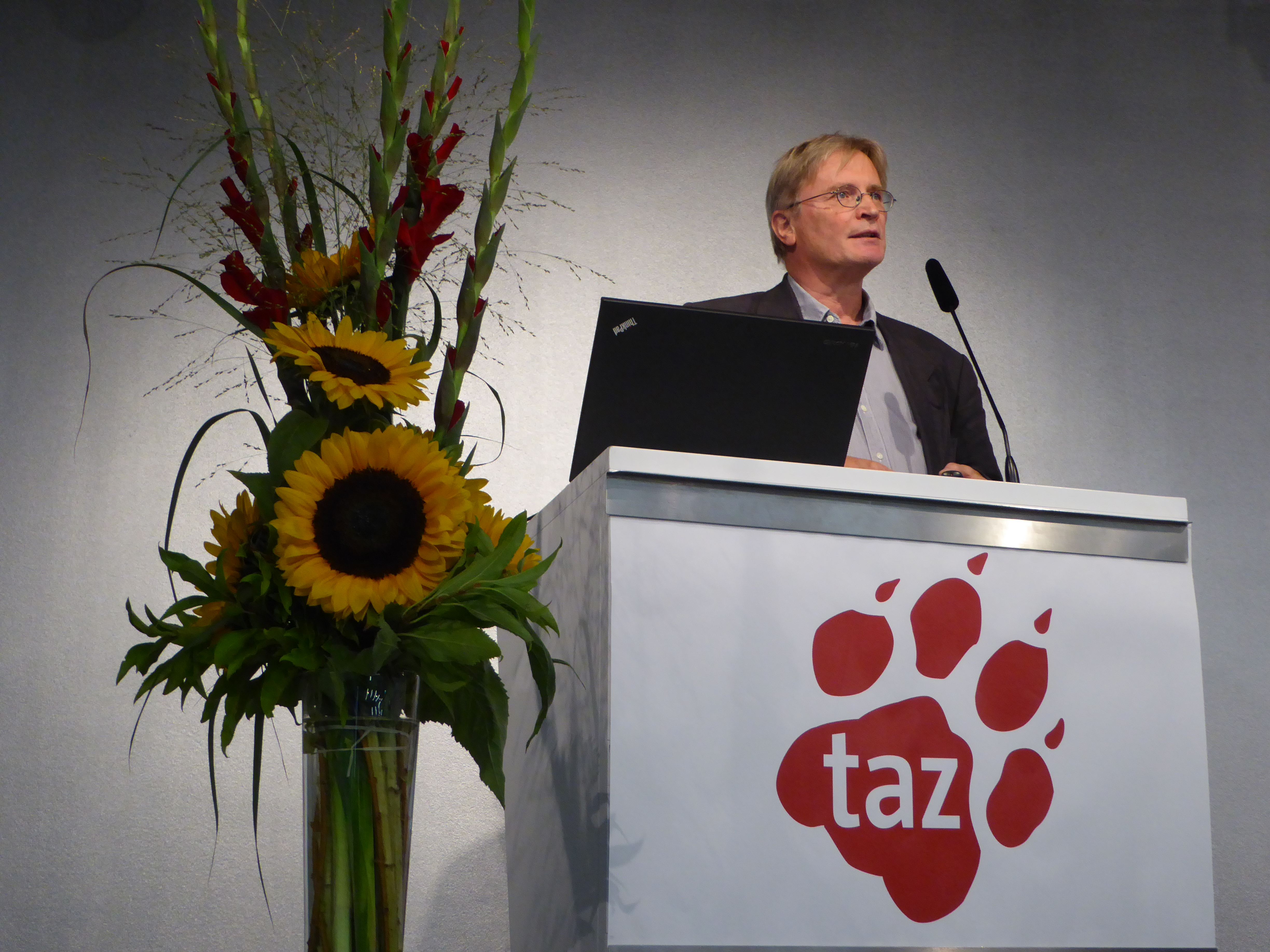 Karl-Heinz Ruch, genannt Kalle Ruch, (* 24. Februar 1954 in Löningen) ist ein deutscher Verlagsmanager. Ruch studierte an der Freien Universität Berlin Volkswirtschaft und gehörte 1978 nach dem Tunix-Kongress zu den Gründern der Berliner Tageszeitung taz, deren Geschäftsführer er seither ist. (Foto: 2016 während der Generalversammlung der taz-Genossenschaft)